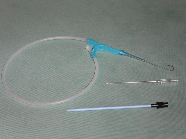 Seldinger-Draht mit Kanüle